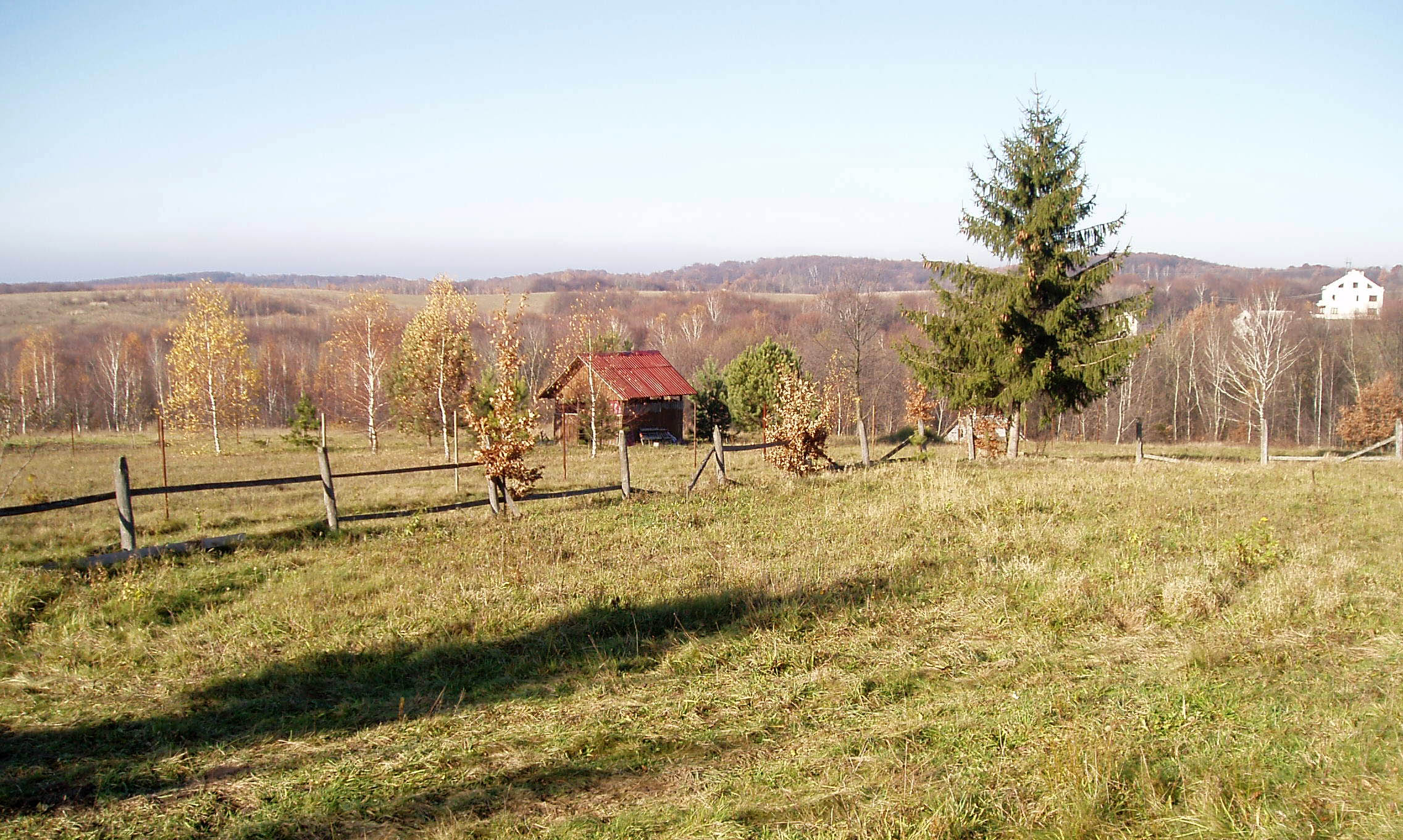 Околиці села Деревач Пустомитівського району Львівської області.